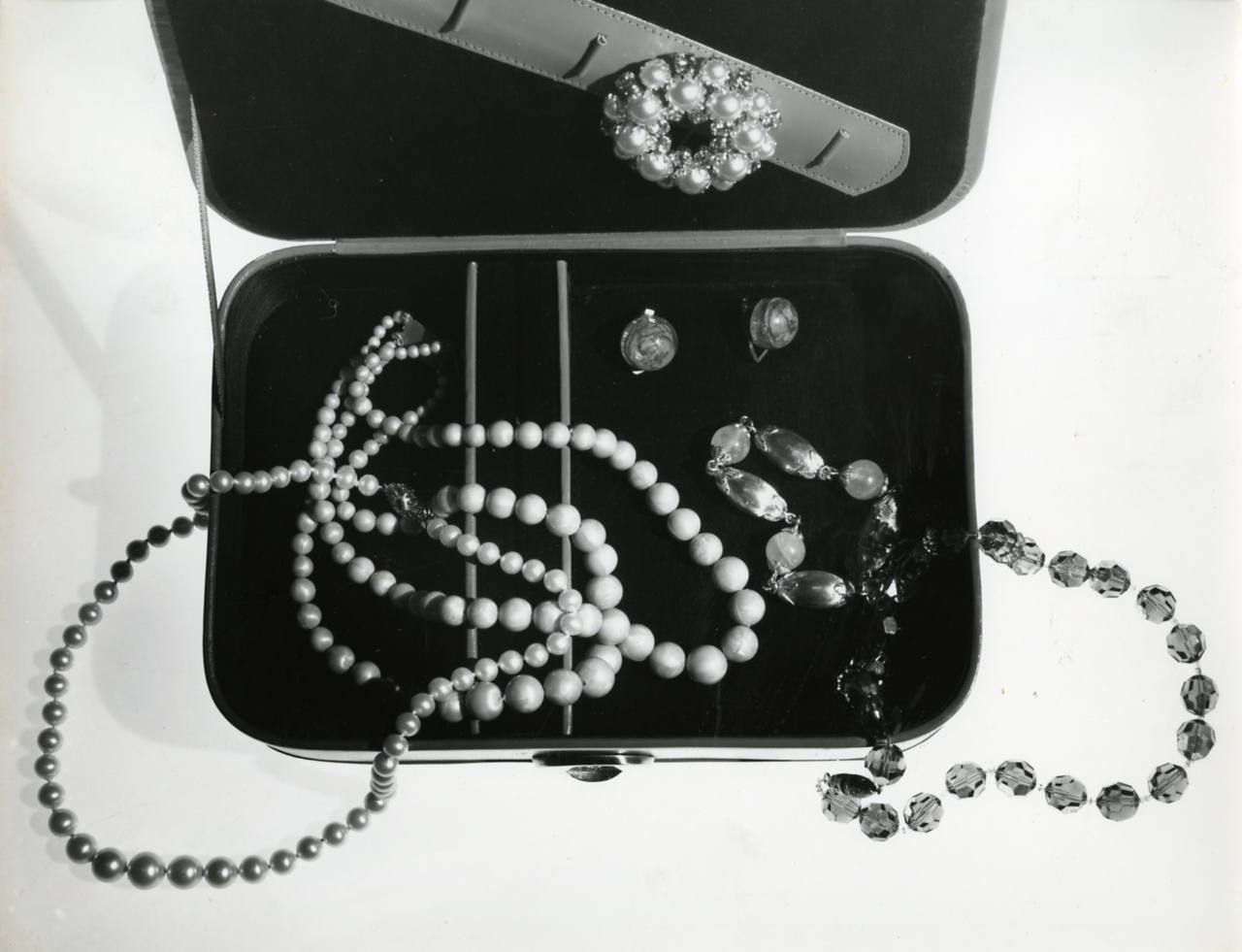 Servizio fotografico : Italia, 1963 / Paolo Monti. - Stampe: 2 : Positivo b/n, gelatina bromuro d'argento/ carta, 24x30. - ((Al verso delle stampe manoscritti i numeri dei negativi corrispondenti: 7256, 7263; timbro a inchiostro con copyright. - Sul coperchio della scatola iscrizione didascalica manoscritta a pennarello nero: "Umbria". - Fonte: Agenda di Paolo Monti: R 1 - Monti/ 1 aprile 1963 - 6 giugno 1964/ 6000-8193 (1963-1964), presso Archivio Paolo Monti